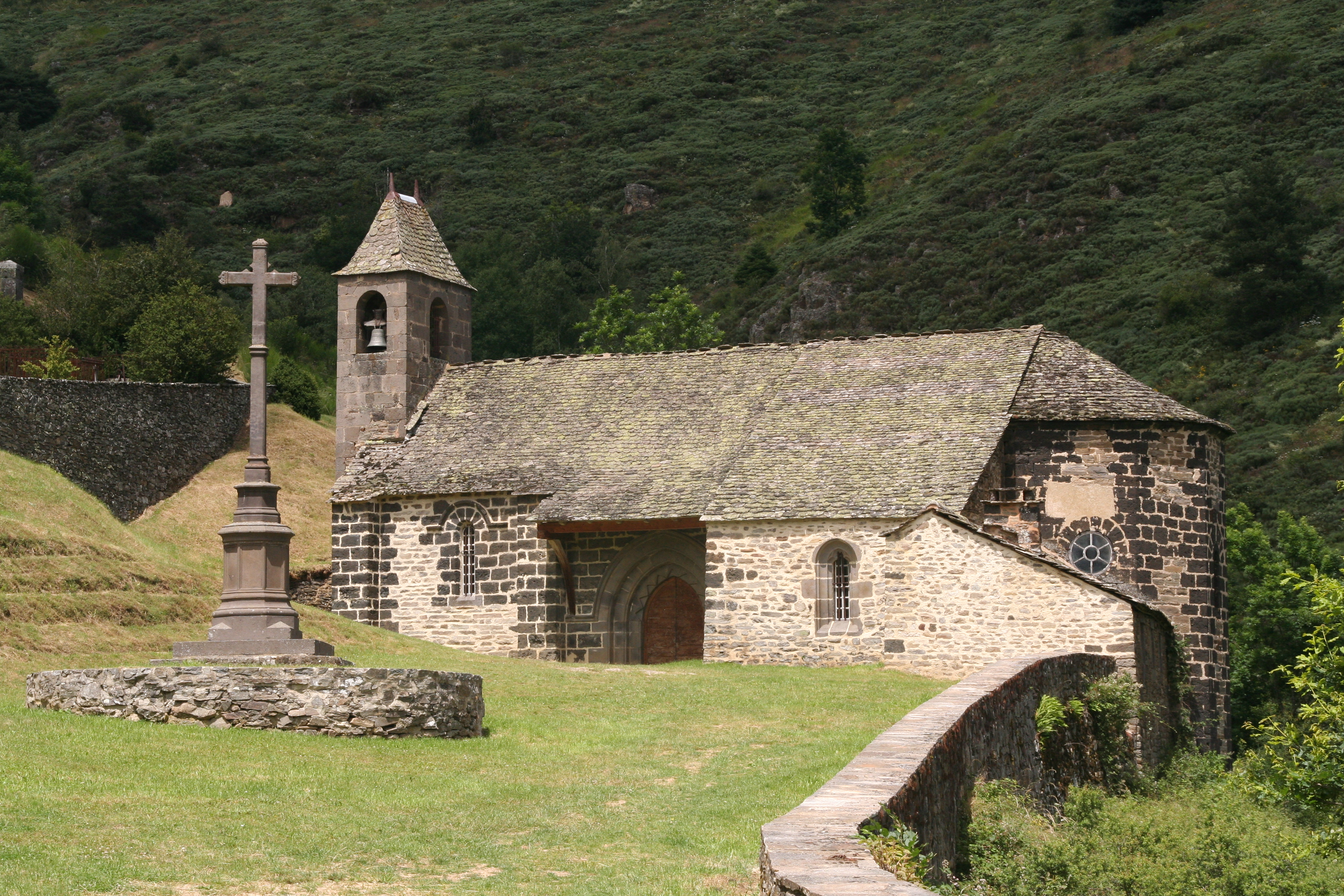 chapelle Saint Illide à Alleuze dans le cantal .